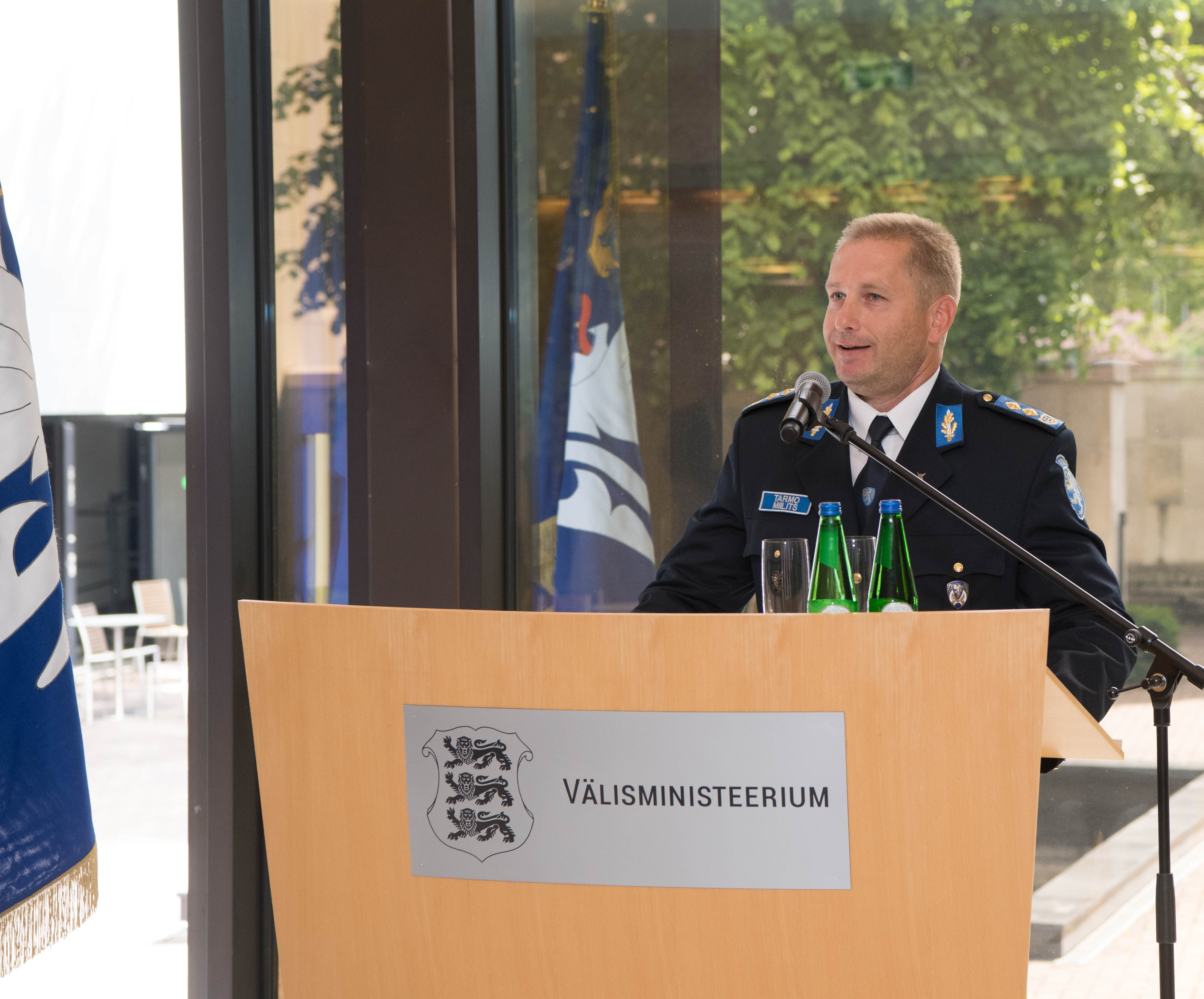 Tarmo Miilits